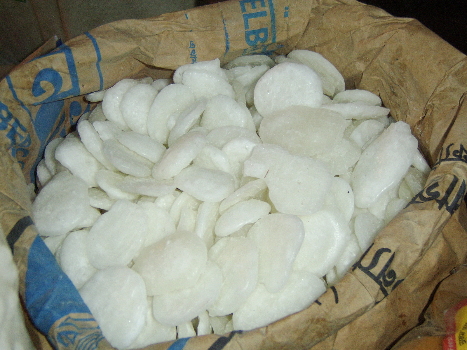 Bangla Style Candy